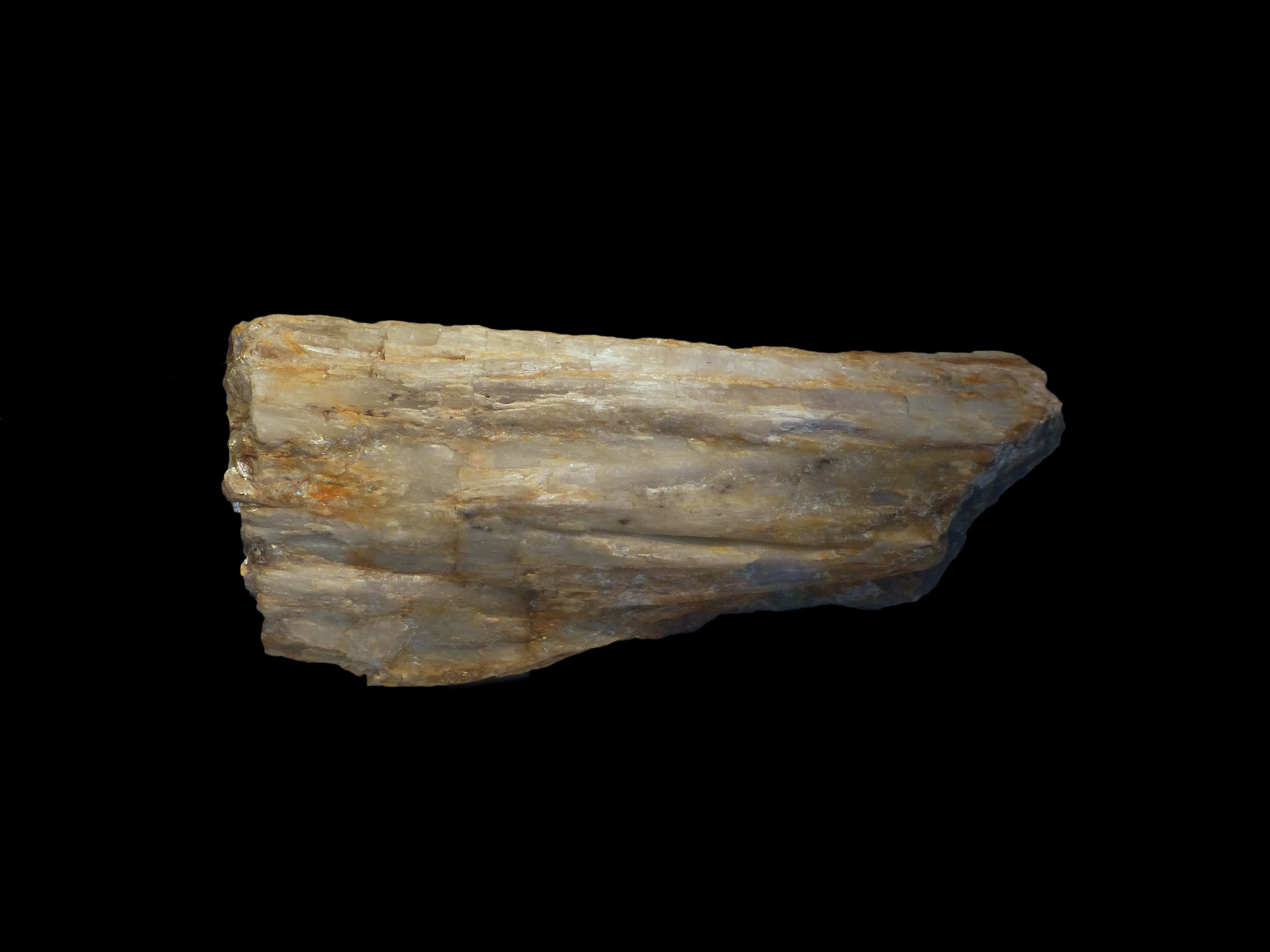 Sillimanite en provenance du Pré Vareth (Sainte-Croix-aux-Mines). Collections du musée de minéralogie de l'université de Strasbourg